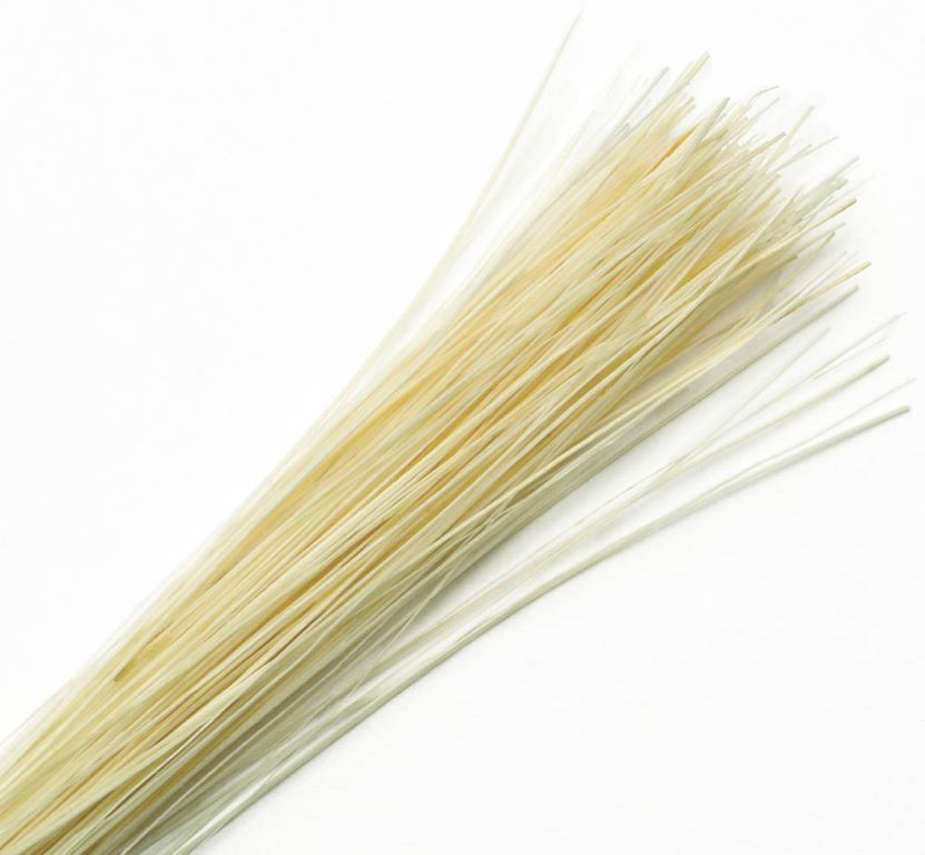 Firbe als Besatzmaterial für Bürsten Foto Hochgeladen durch OSBORN International, Freigabe unter der unten genannten Lizenz.